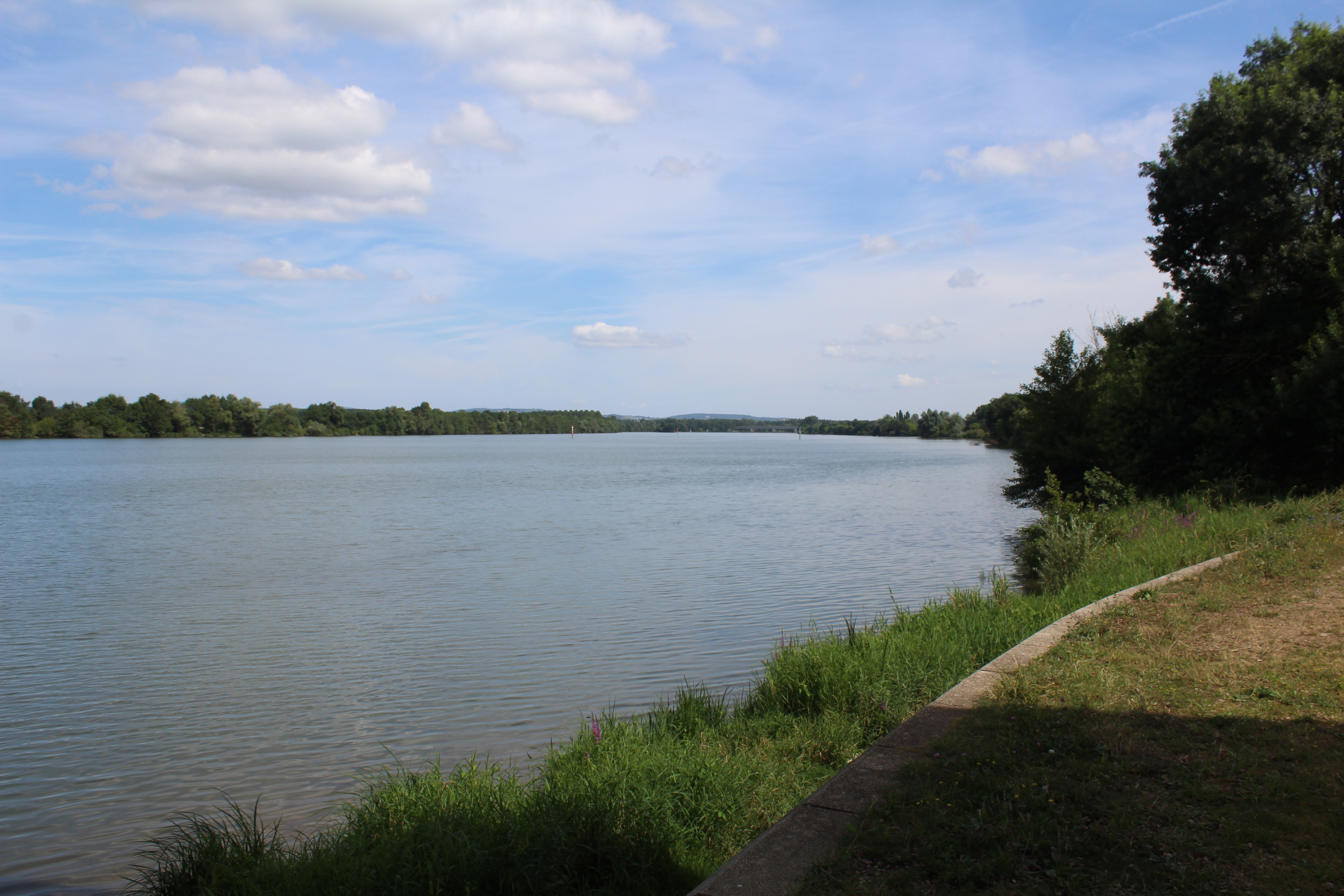 La Saône près du pont d'Arciat à Cormoranche-sur-Saône.